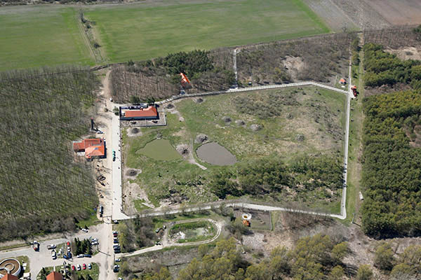 Veresegyházi Medvepark